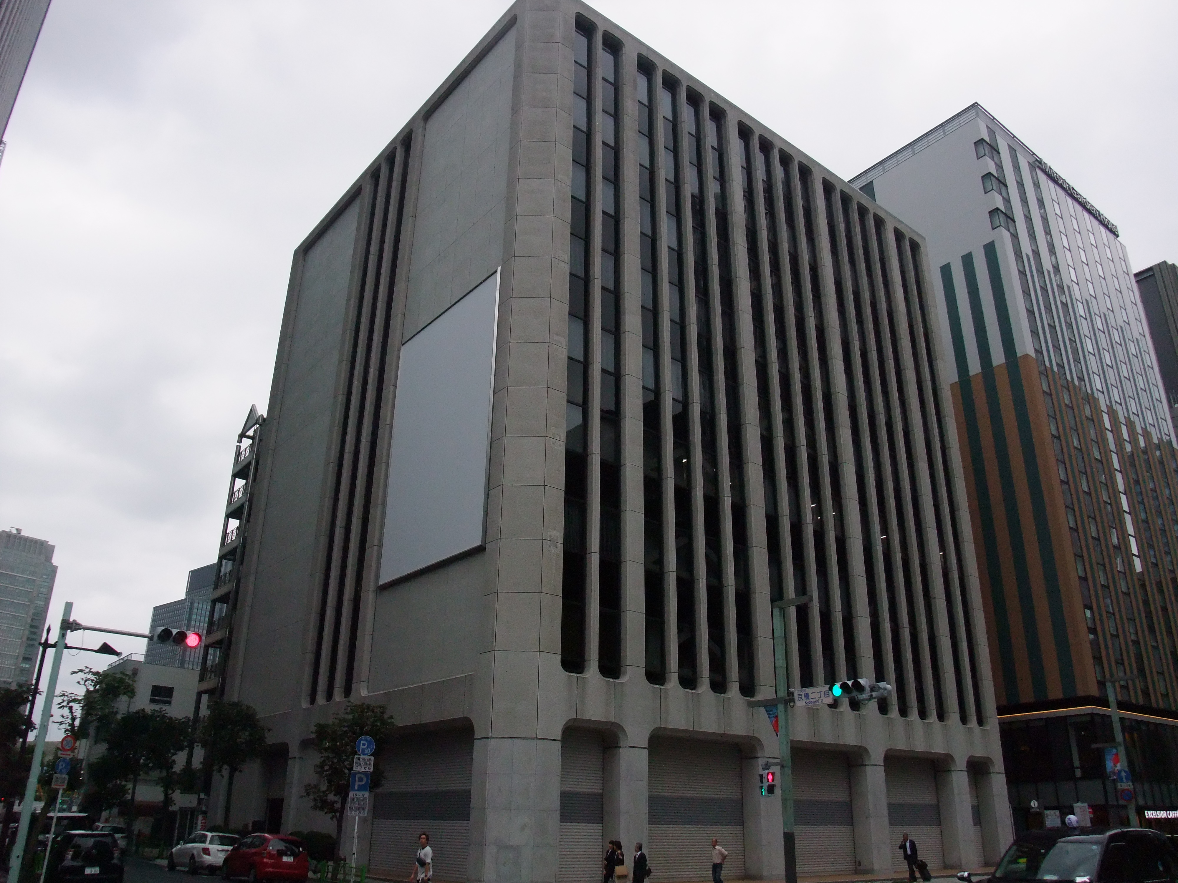 東京都中央区京橋一丁目5番8号の三栄ビル